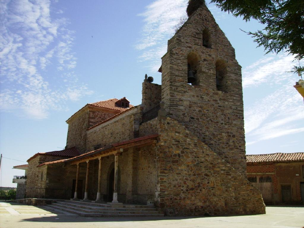 Plaza Mayor